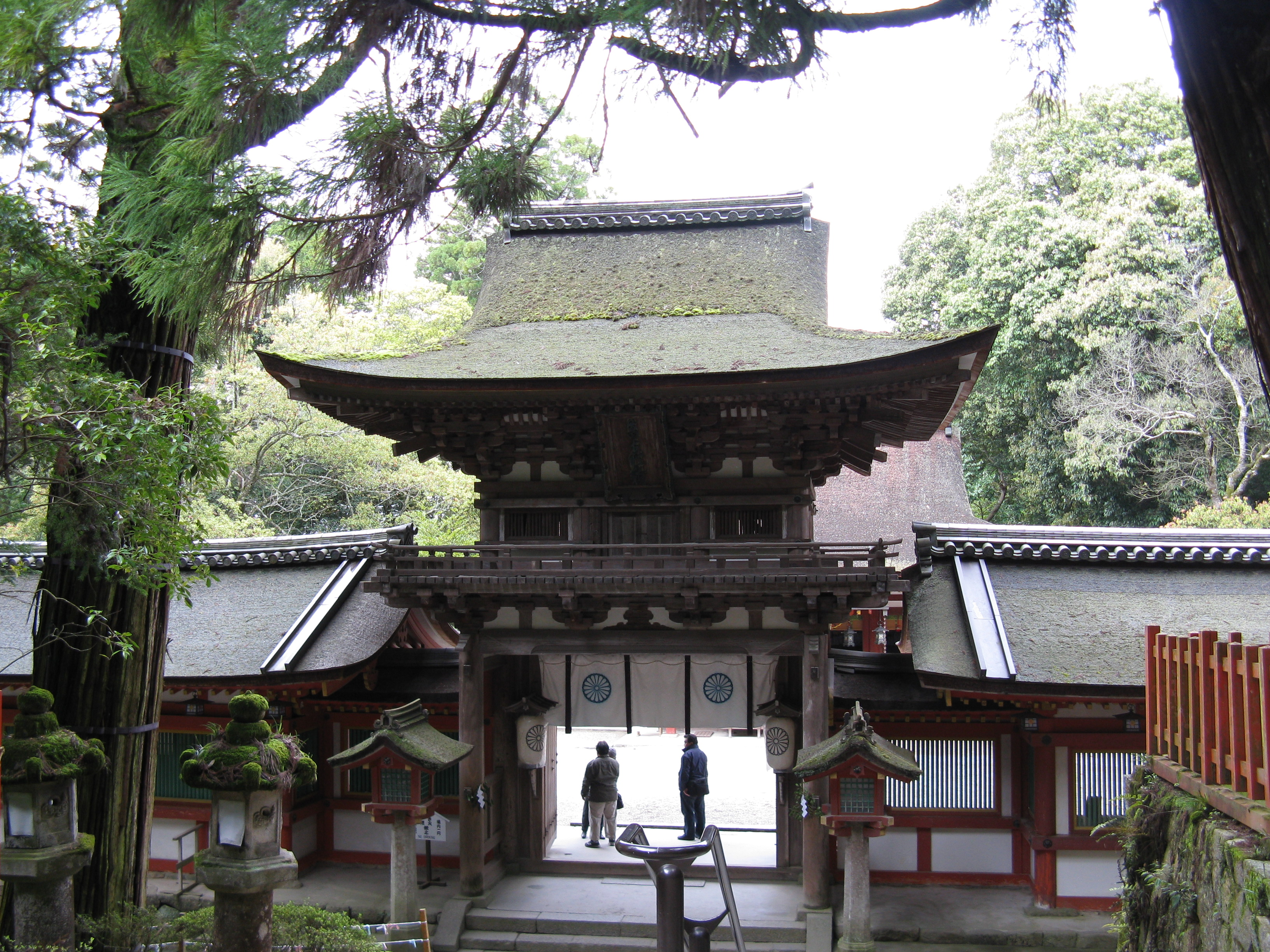 石上神宮 楼門